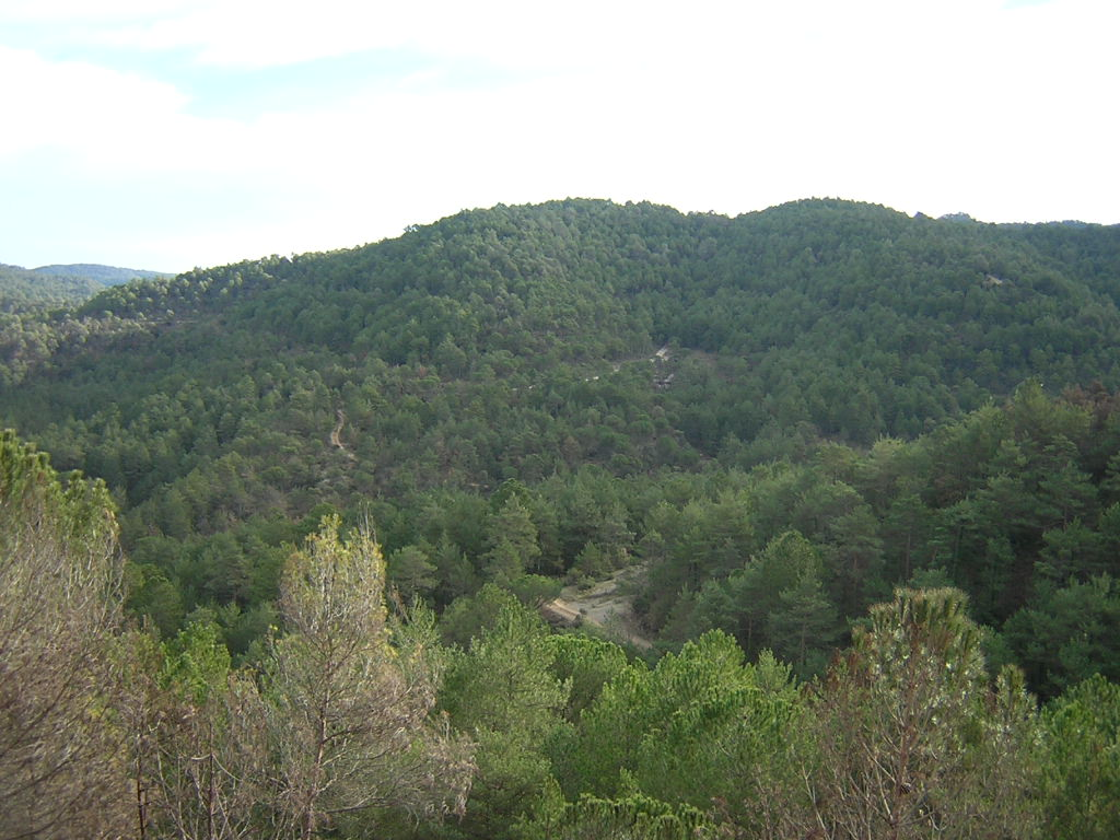 La Muntanya de la Sala (Monistrol de Calders, Moianès)